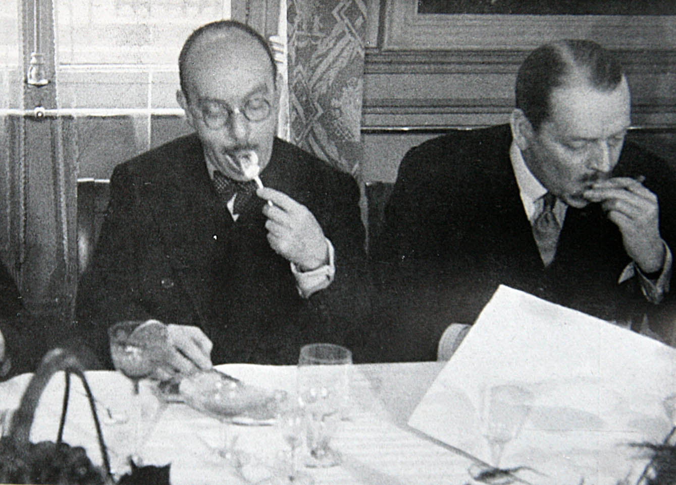 Paul Reboux et Bertrand Guégau Académie des gastronomes 1932